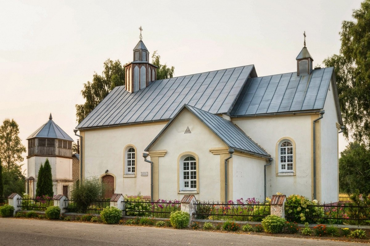 Канстанцінава. Касцёл Найсвяцейшай Тройцы